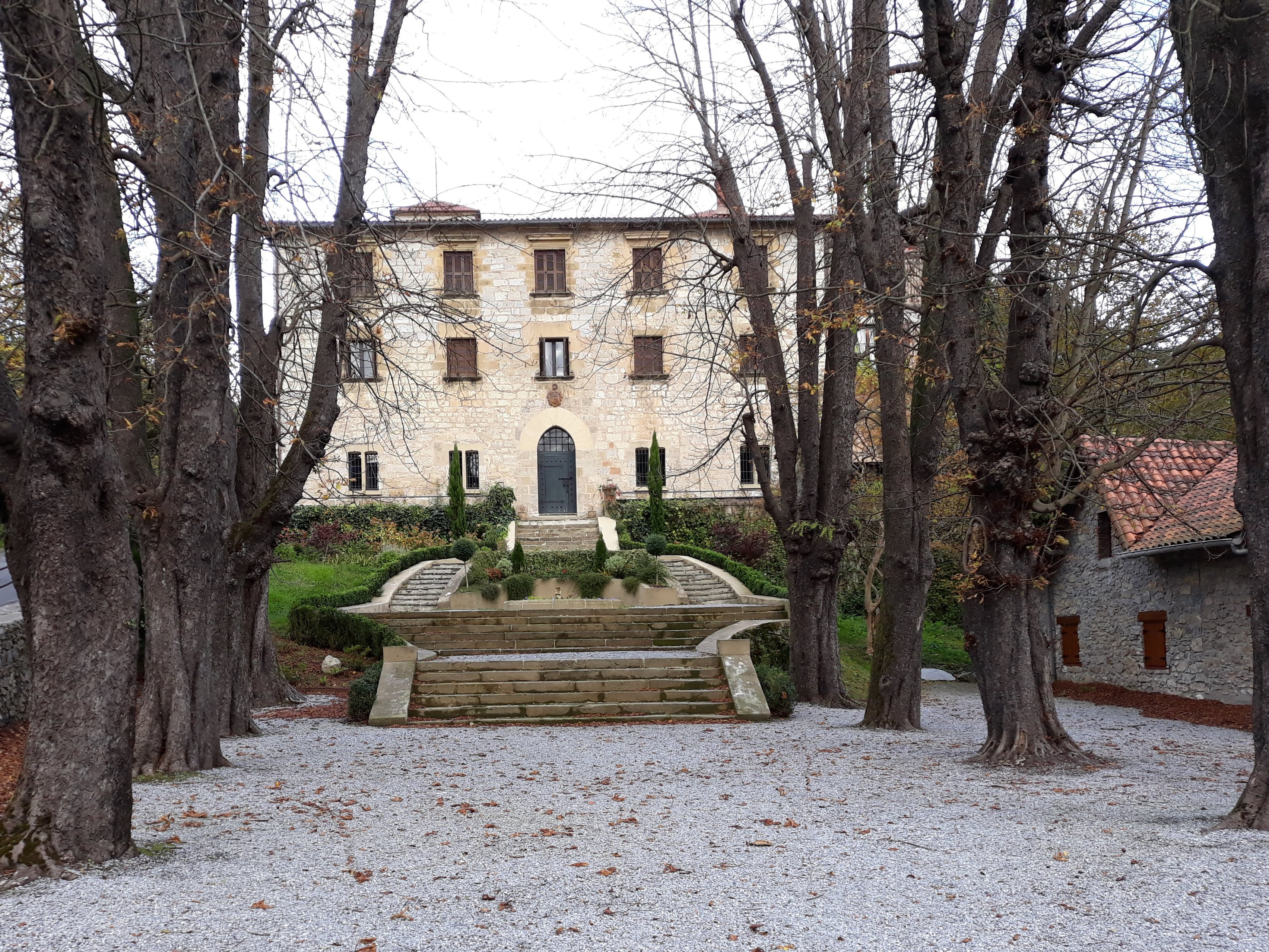 Vista general